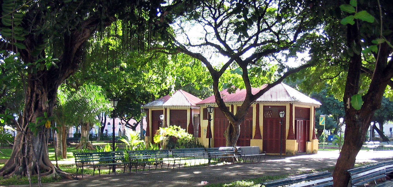 Predios dentro da área do Pessio Público de Fortaleza - Brasil.